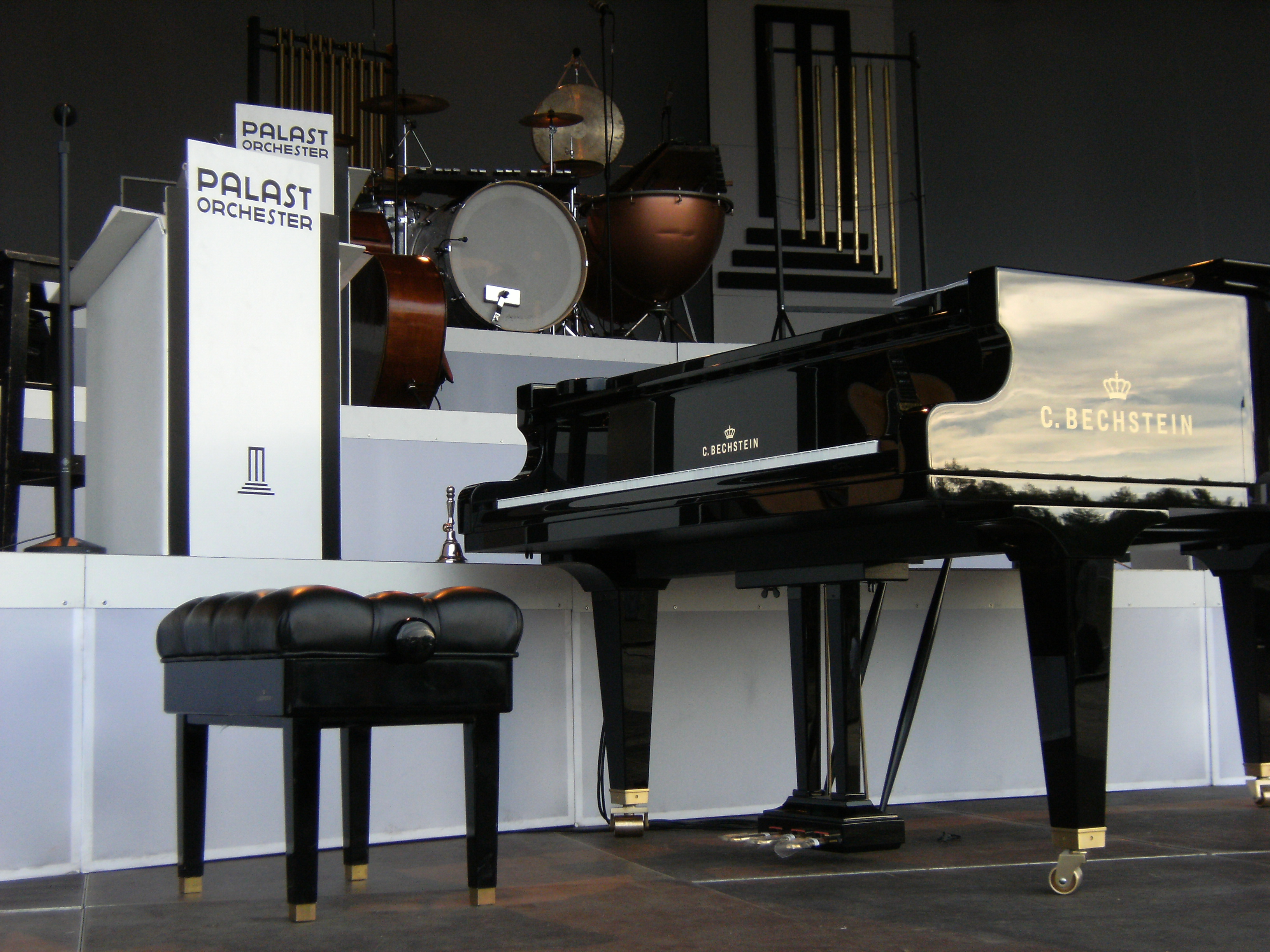 Max Raabe Konzert: Heute Nacht oder nie. F60, Lichterfeld 2008. (Alter Fritz)